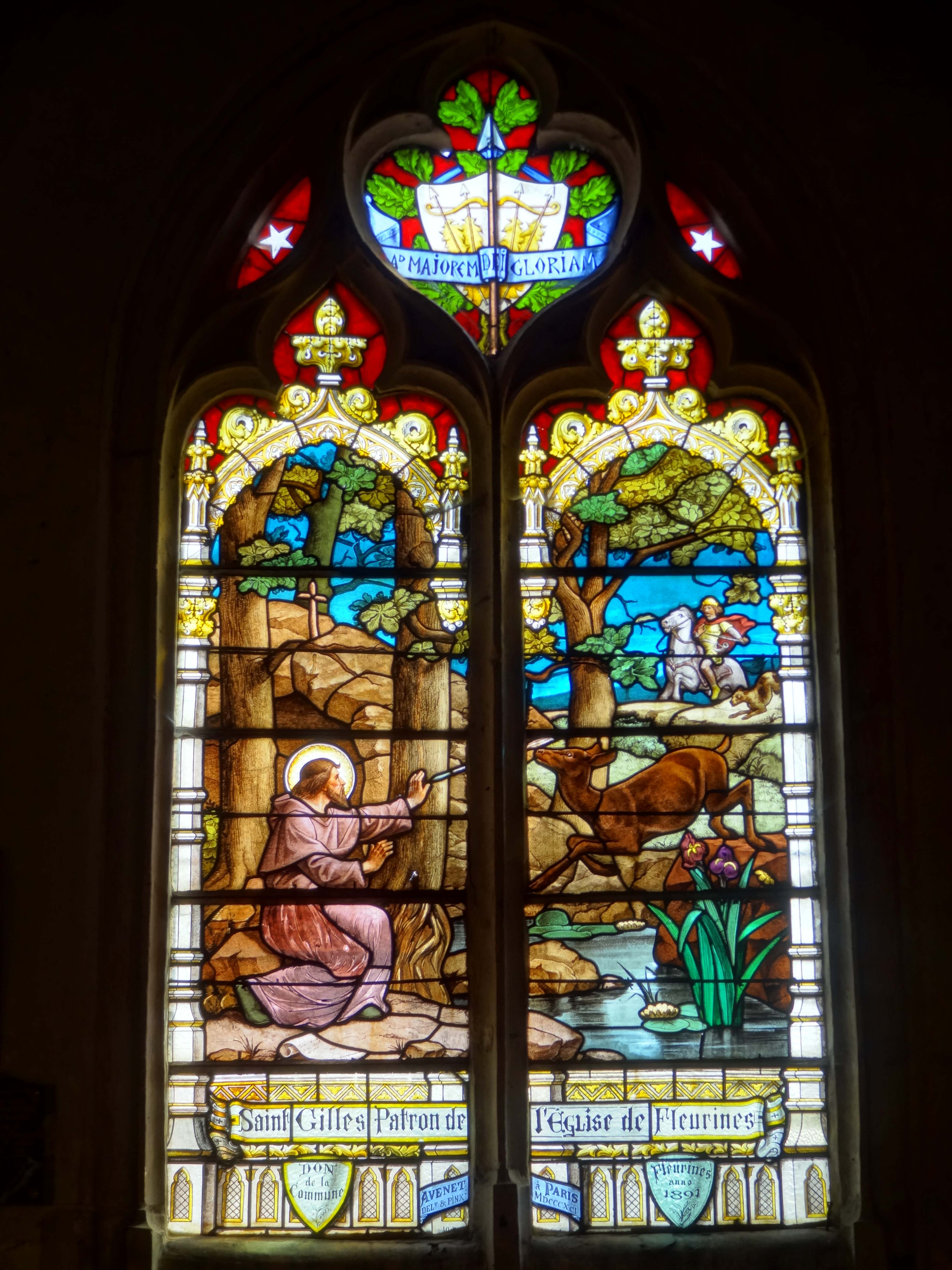 Vitraux de l'église - voir titre.